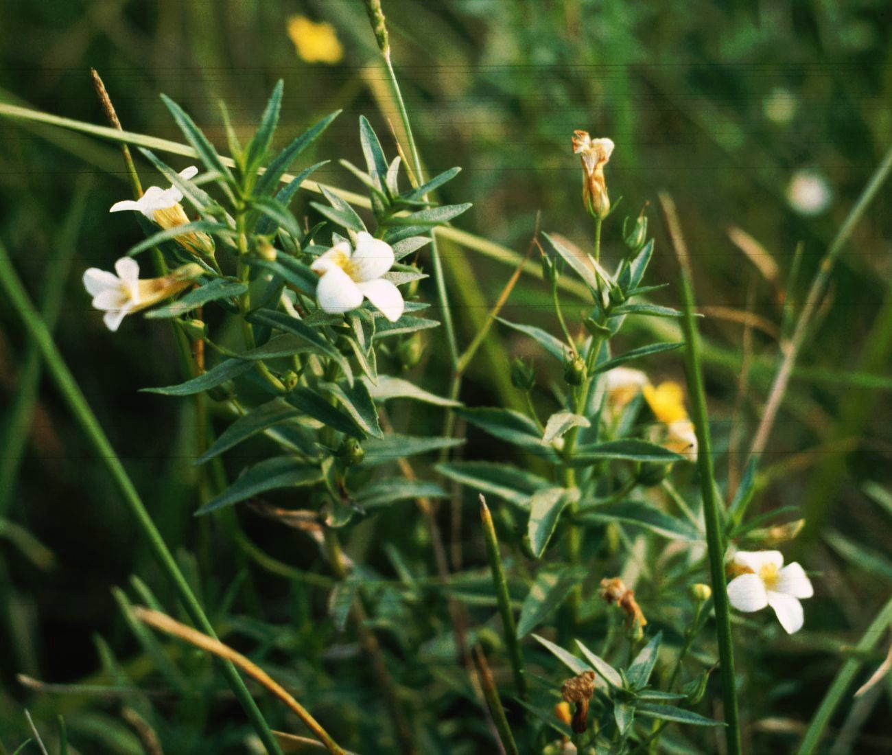 Gnadenkraut (Gratiola officinalis), Wegerichgewächse (Plantaginaceae) - Rumänien/România: Oltenien, Balta SW Baia de Aramă